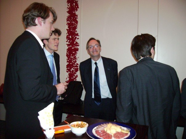 Rinnooy Kan op de NEWS Jaardag. Eigen werk.